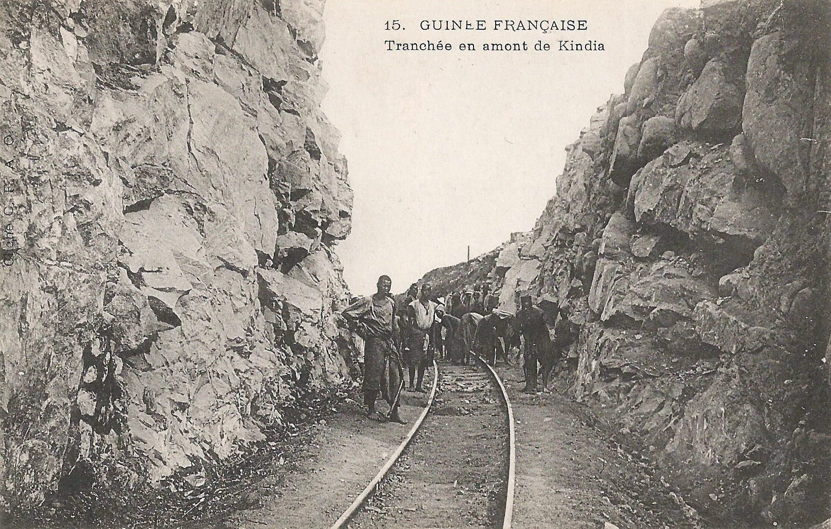 Tranchée en amont de Kindia. sans mention d'auteur, d'éditeur ou de date Guinée française